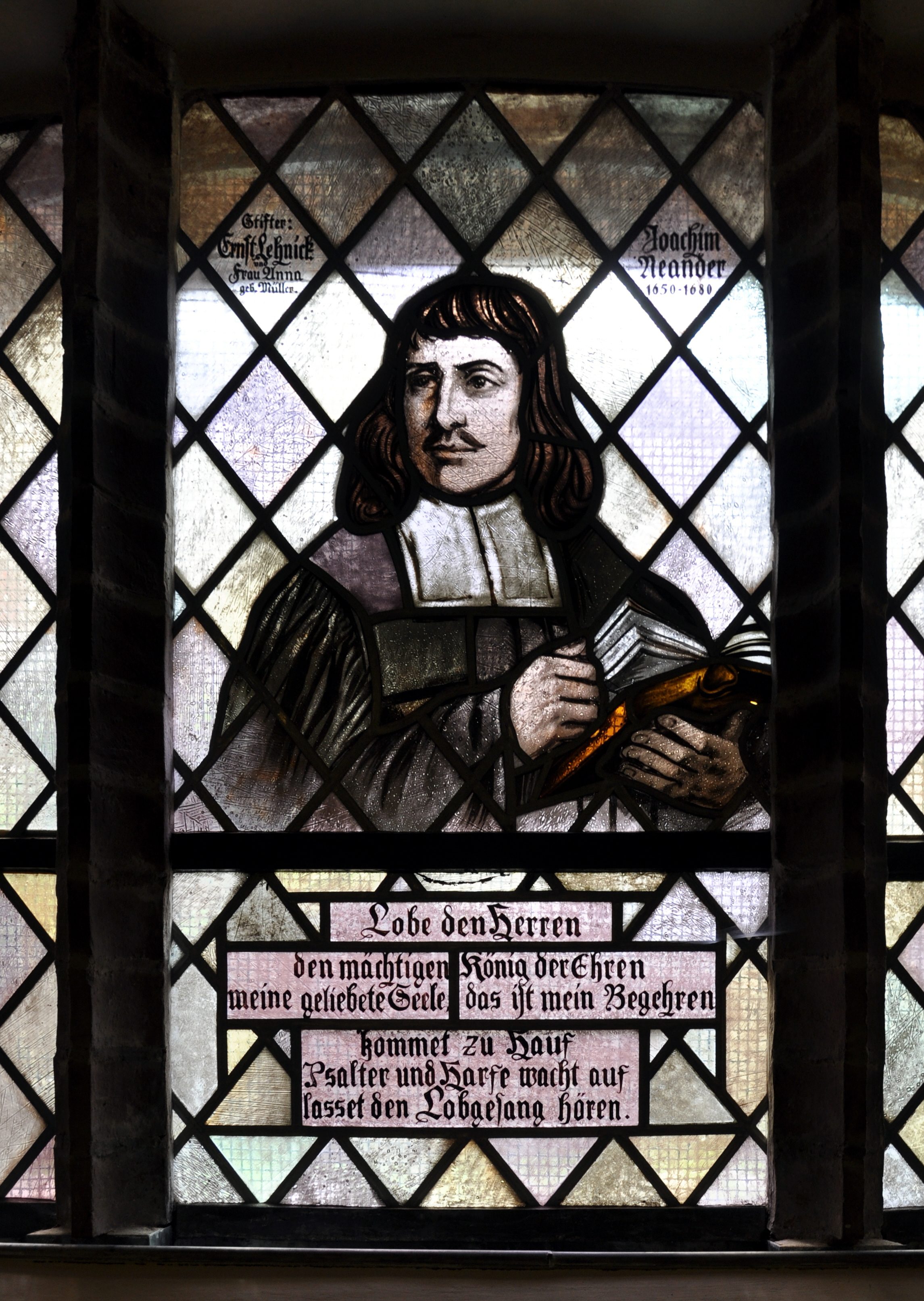 Lübben, Paul-Gerhardt-Kirche, Fenster mit Portrait von Joachim Neander